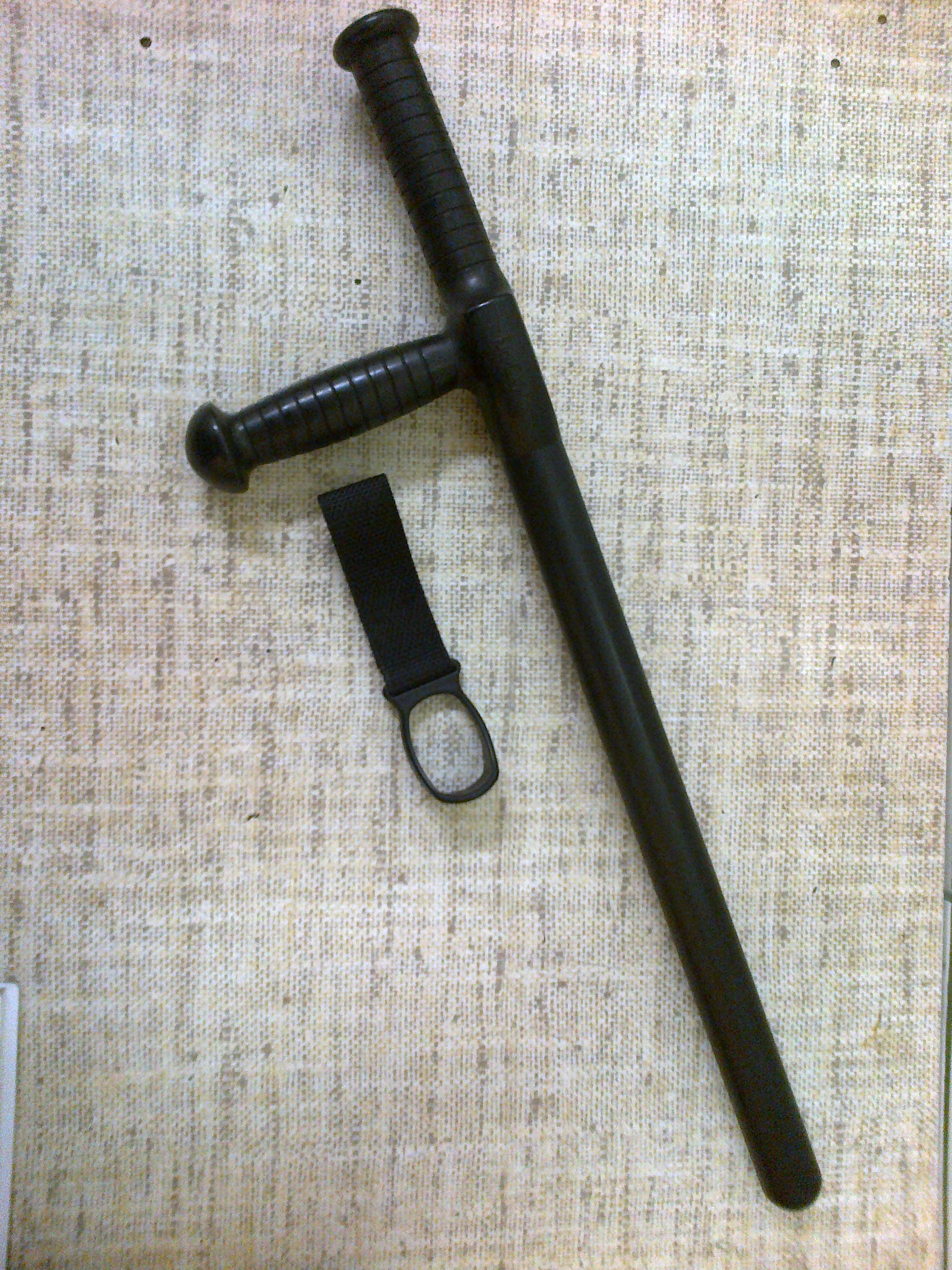 Pałka służbowa "TONFA" wraz z uchwytem